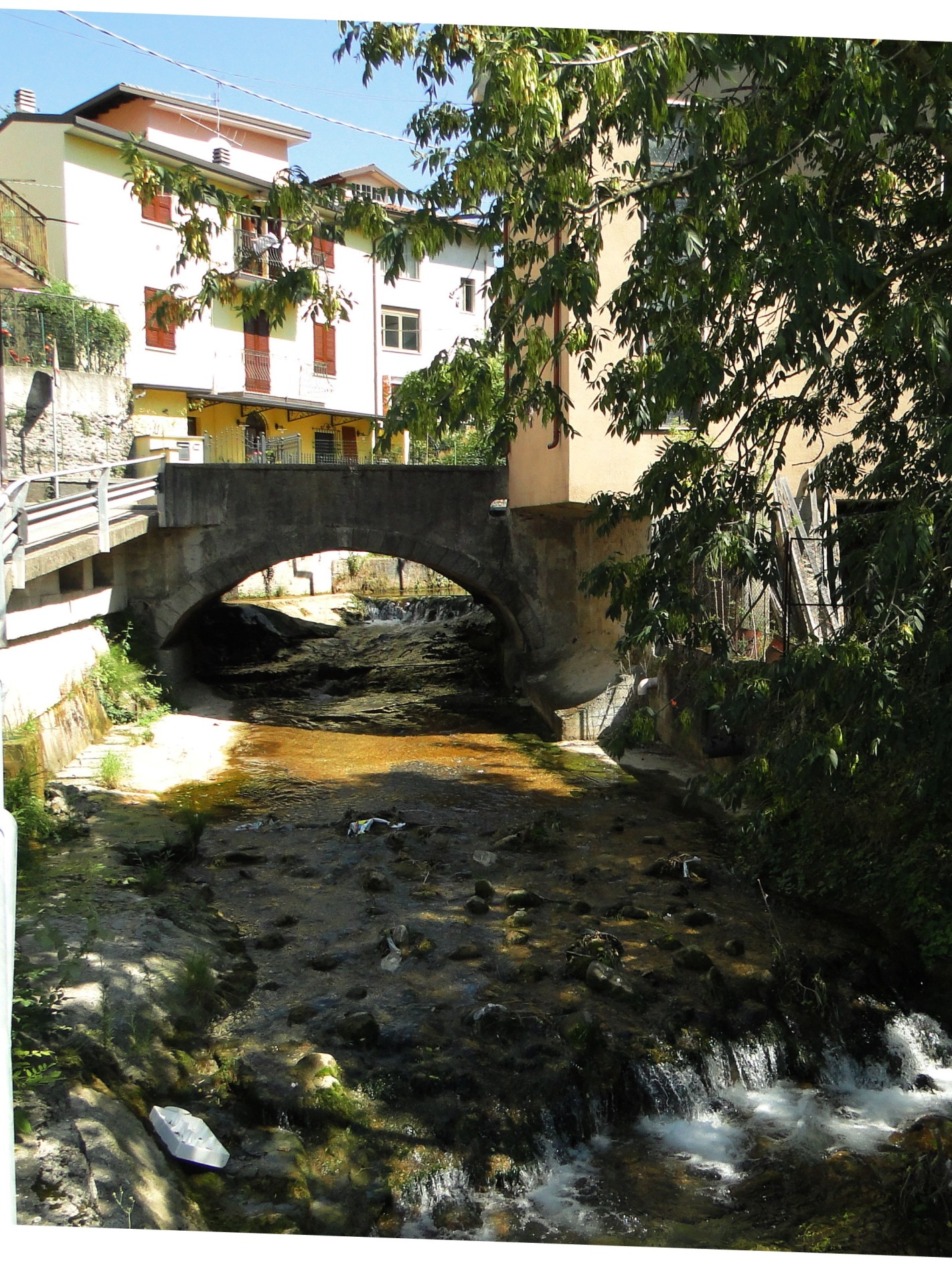 Ponte sul torrente Doppia, di collegamento tra Cene di Sopra e Cene di Sotto. Cene (BG), Italia